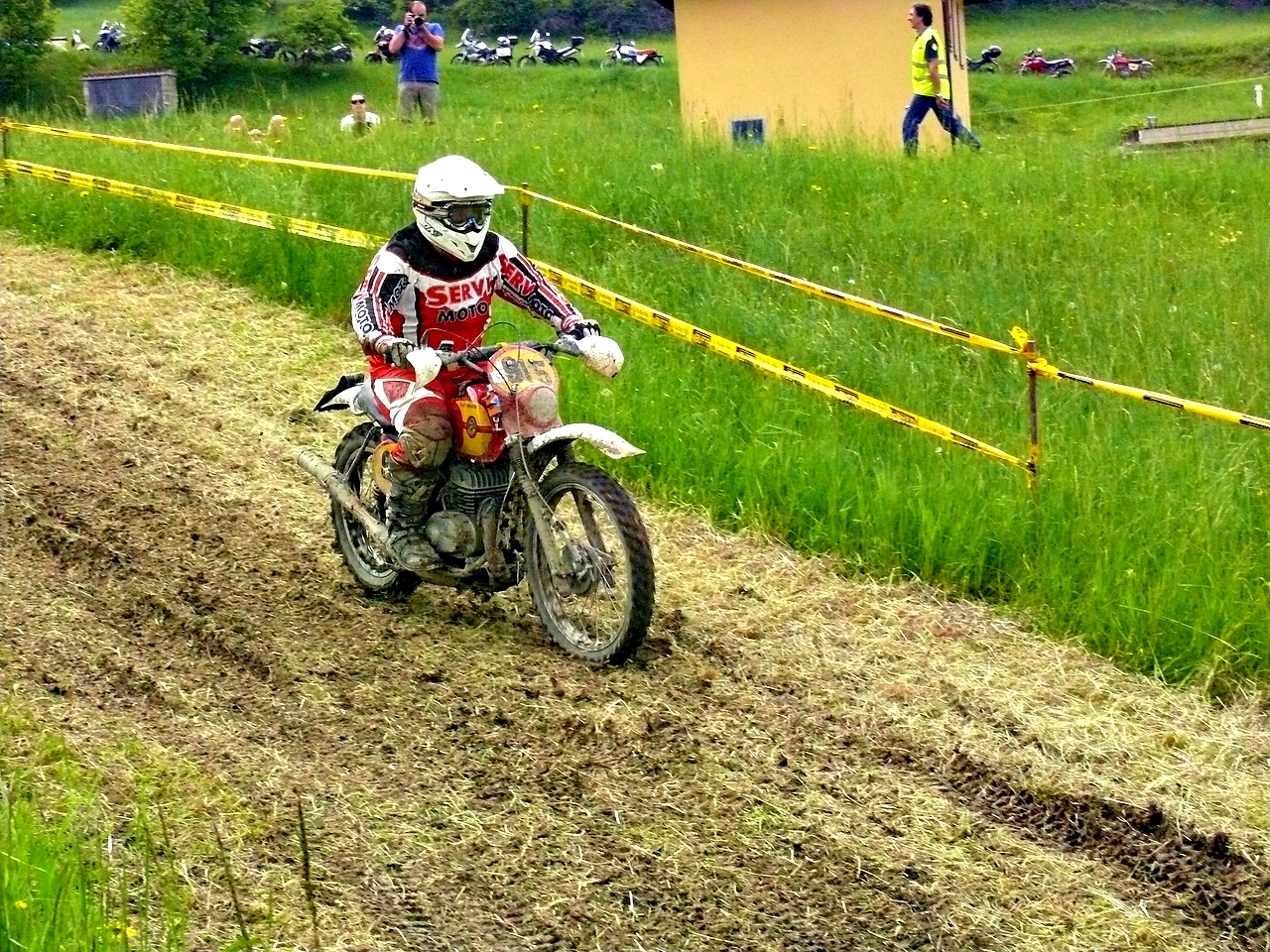 Bultaco Frontera MK10 370 rider